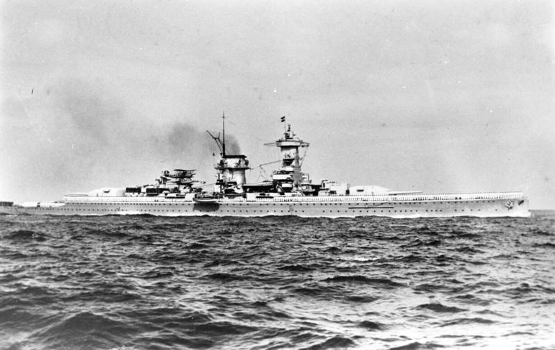 Panzerschiff "Admiral Scheer" Panzerschiff "Admiral Scheer", später schwerer Kreuzer "Admiral Scheer", mit angetretener Besatzung in Paradeaufstellung auf See. Ansicht der Steuerbordseite